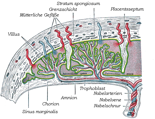 Placenta.